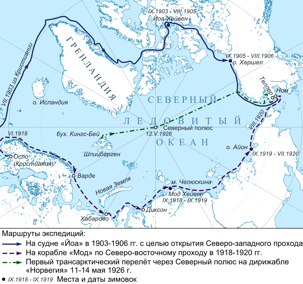 Карта арктических экспедиций Амундсена. Инструменты: GMT, Inkscape